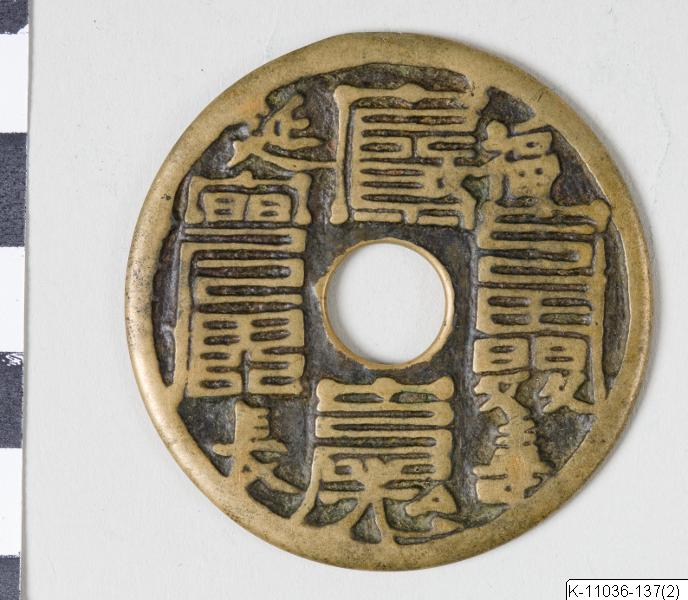 Amulettmynt med dekor på båda sidor. K-11036-137 inköp Larssons samling Uppgifter hämtade från K-katalogen China.